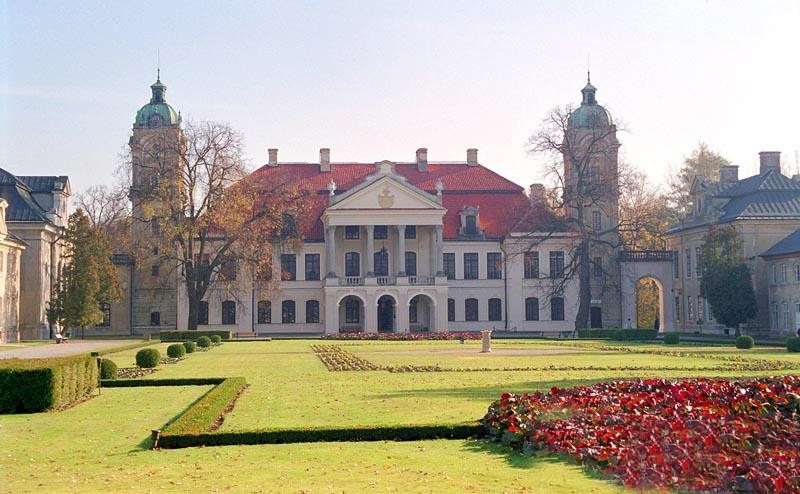 Castle in Kozłówka in Poland